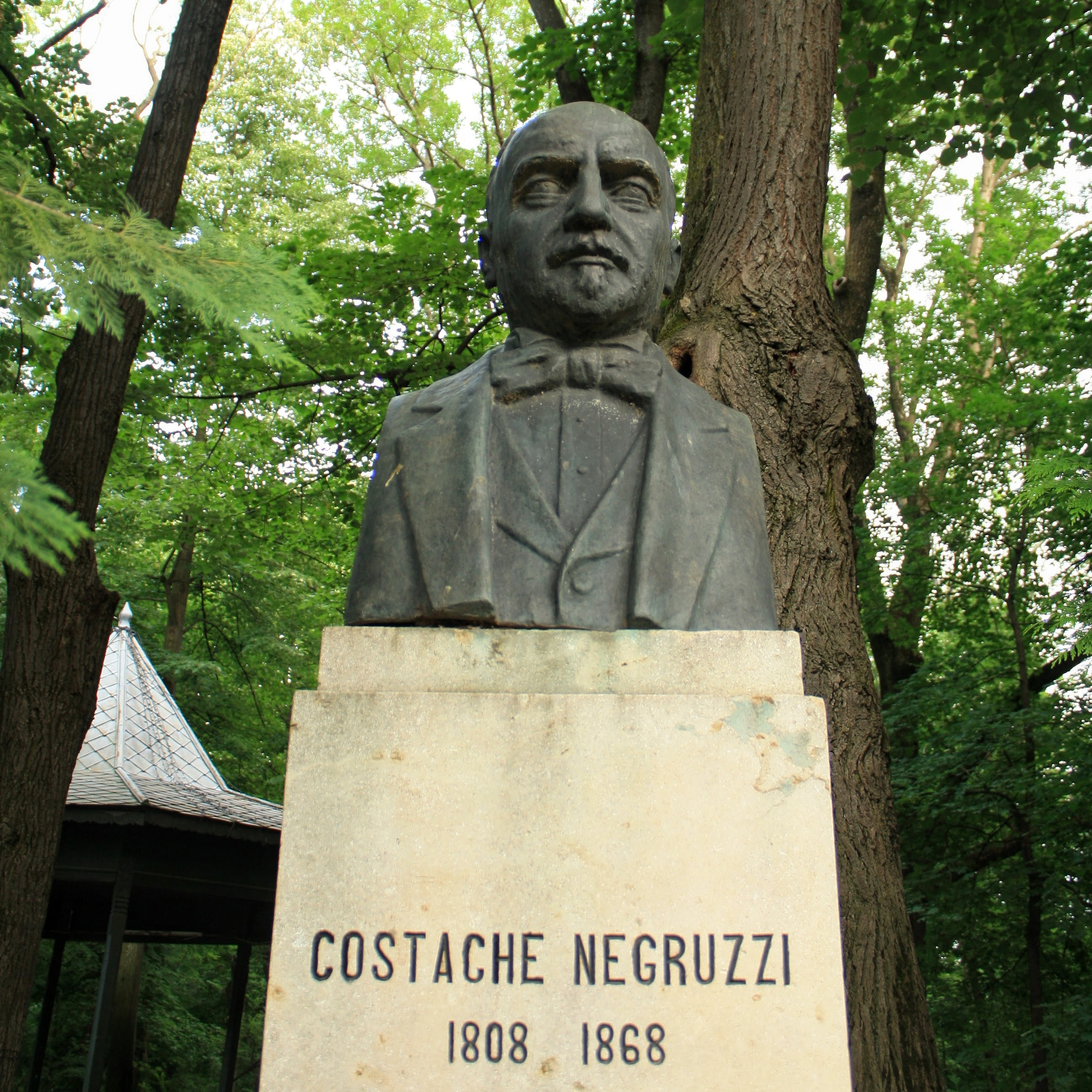 Bustul lui Costache Negruzzi (Ion Mateescu (sculptor), 1934) din Parcul Copou, Iaşi